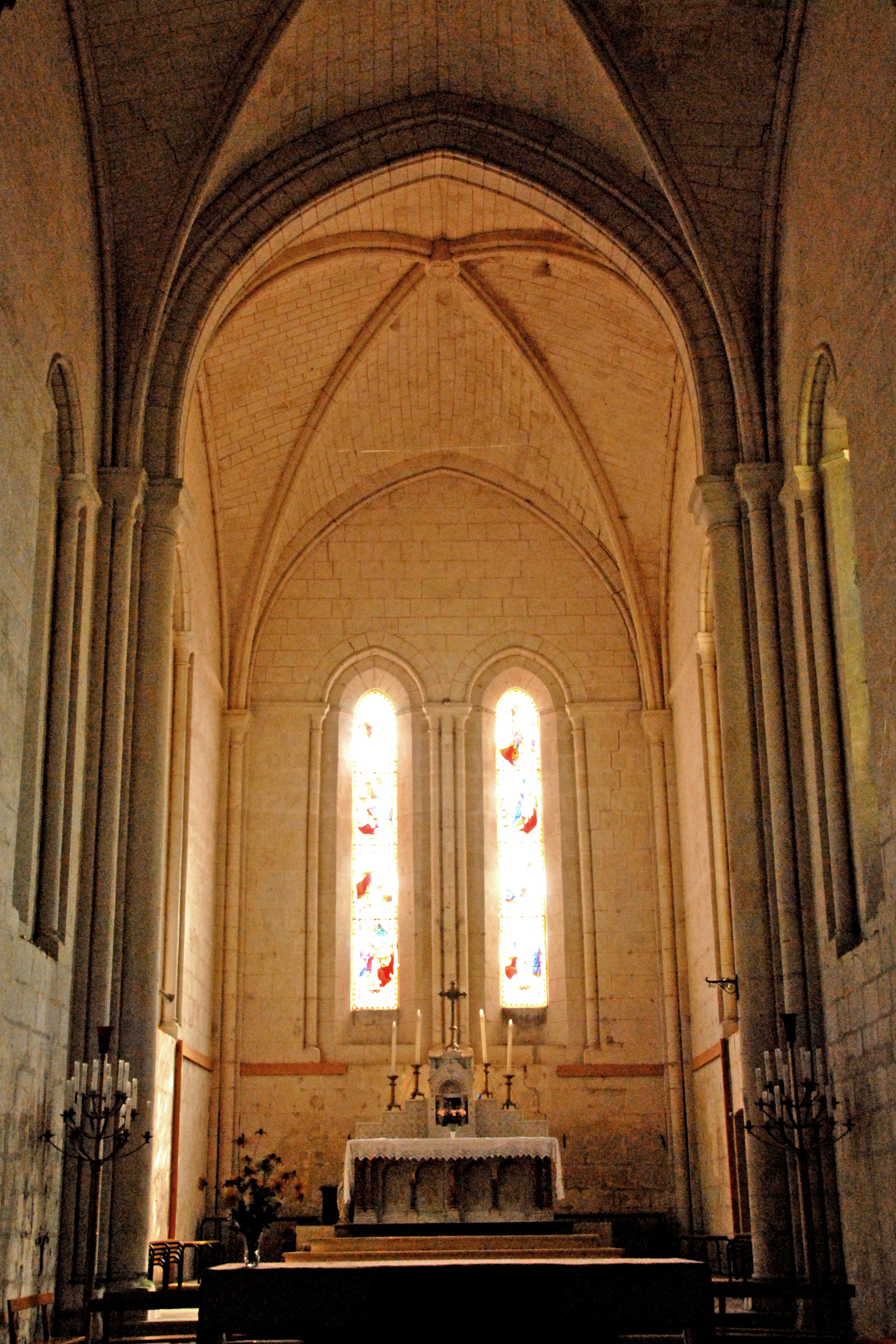 St-Pierre de Pont-l’Abbé-d’Arnoult (17), Chor